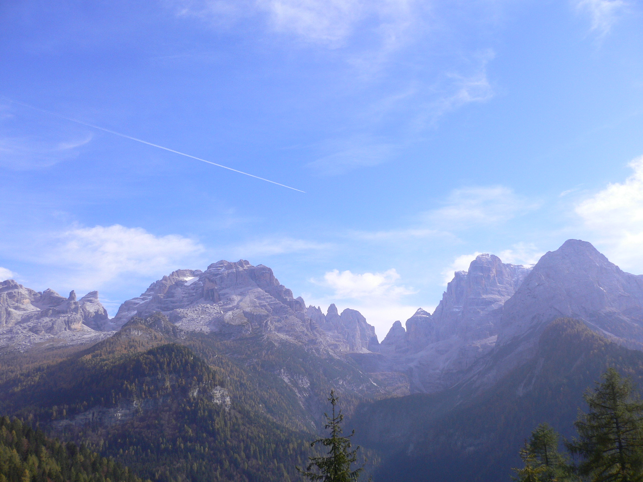 Brenta-Gipfel nahe Madonna di Campiglio